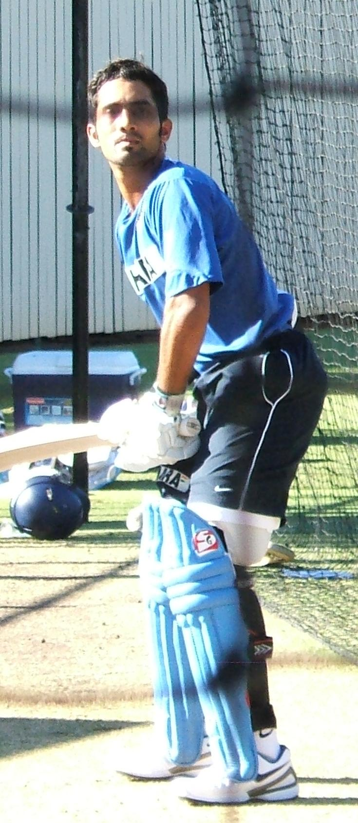 Dinesh Karthik at Adelaide Oval